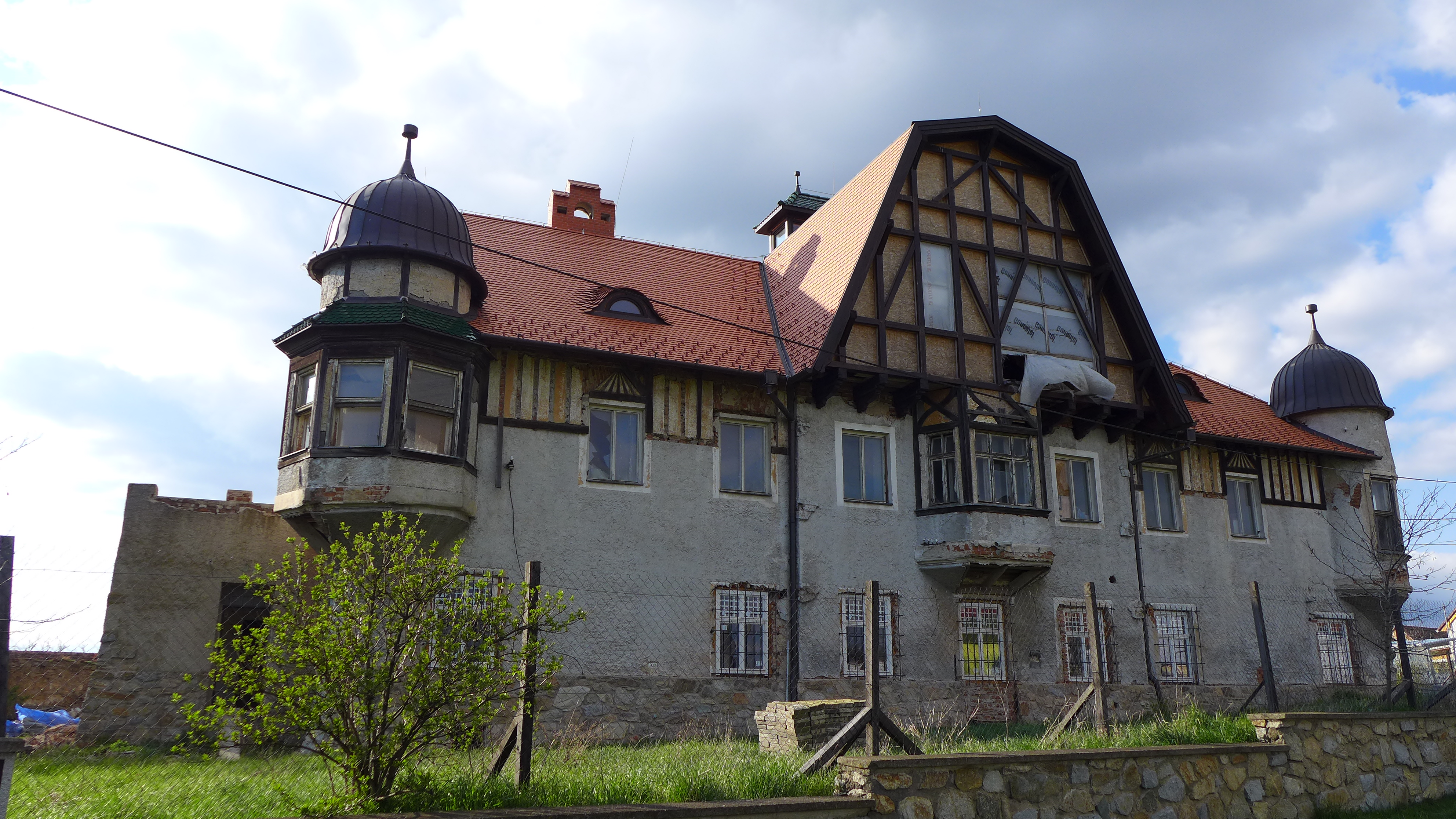 Urbanisticko architektonická zástavba historického jádra obce, čp. 1, 44, 45, 46, 63, 64, Újezd (okres Znojmo).